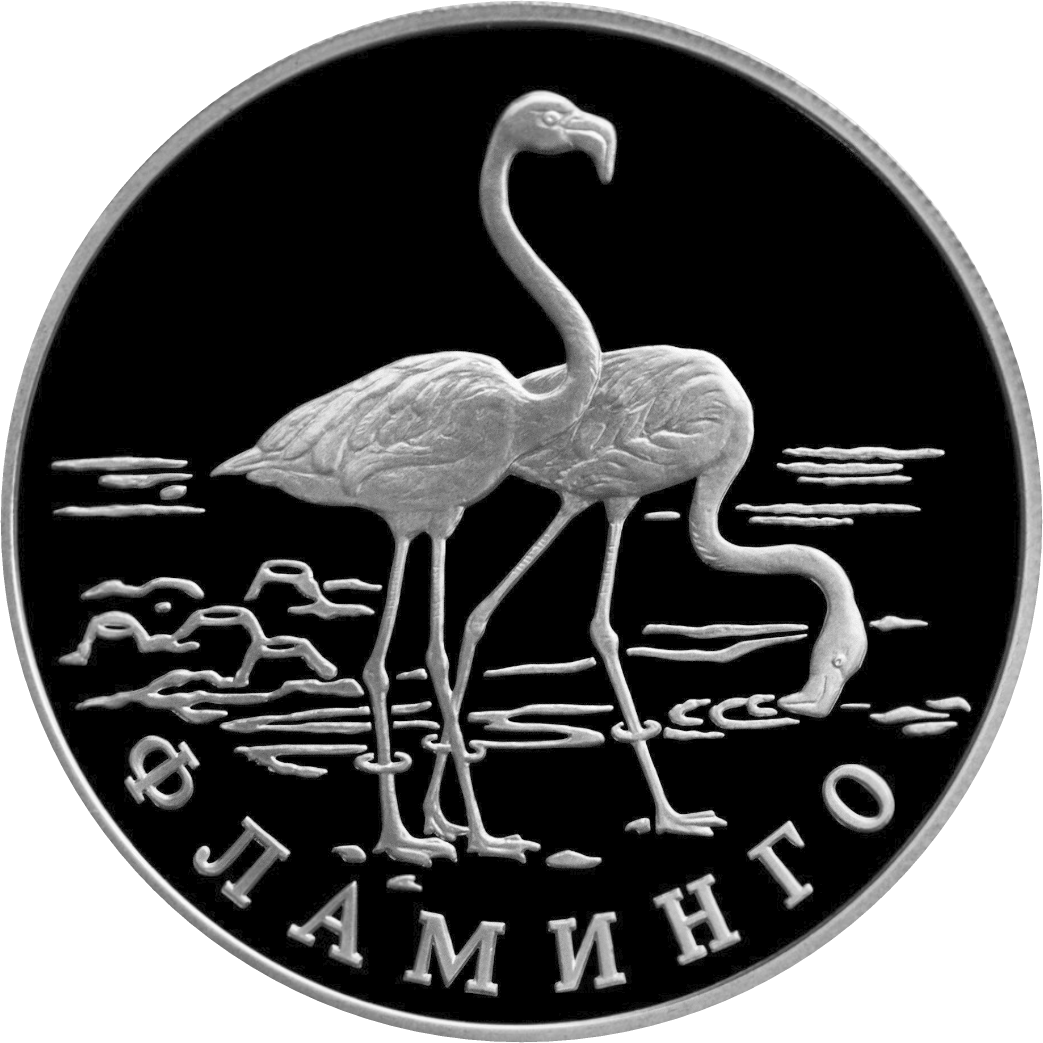 Серия: «Красная книга», Фламинго, 1 рубль, реверс.